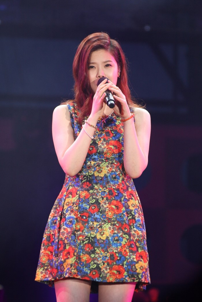 대한민국의 가수 린